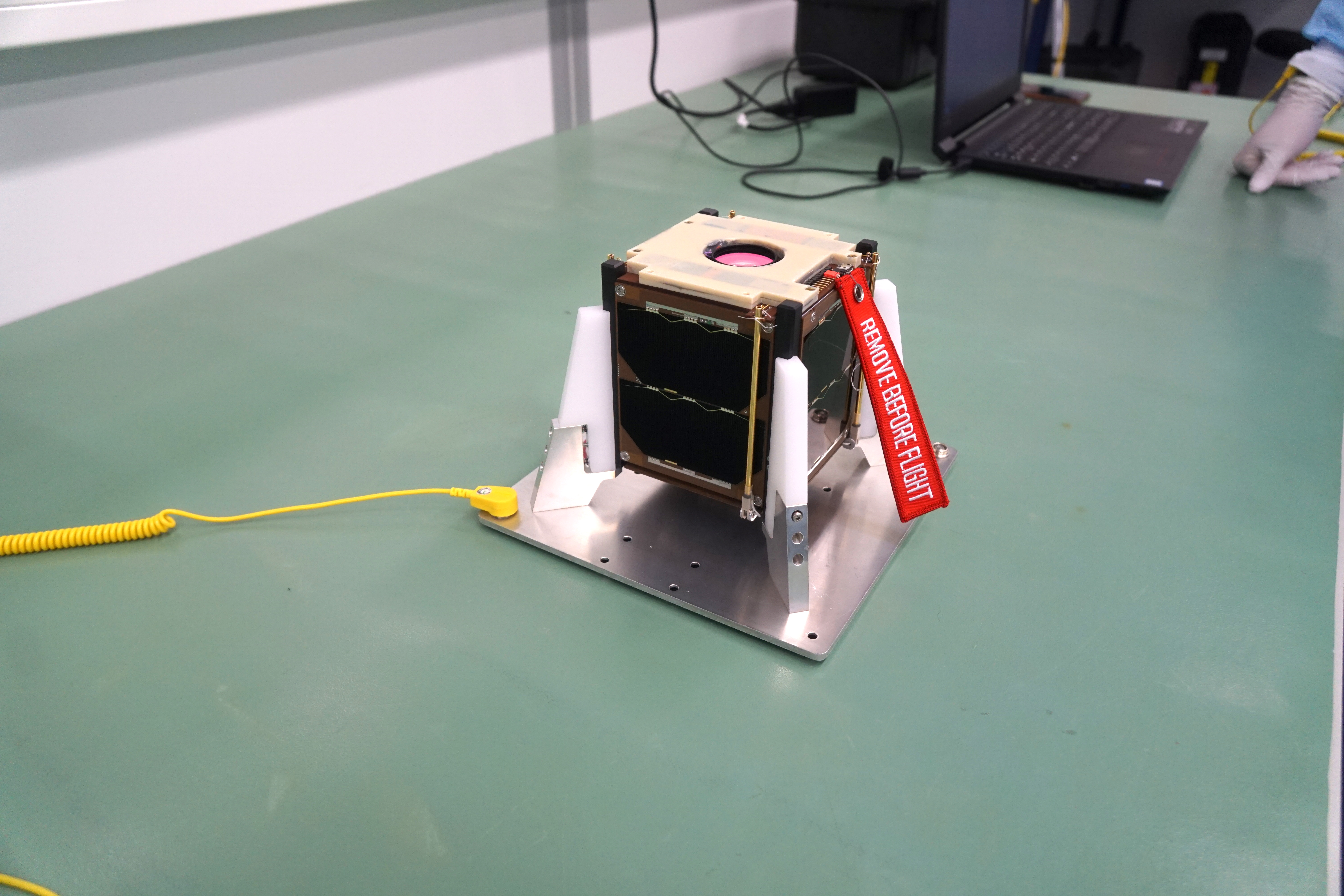 Suomi 100 -satelliitti laukaisuvälittäjän tiloissa Delftissä, Alankomaissa juuri ennen integrointia laukaisusovittimeen.